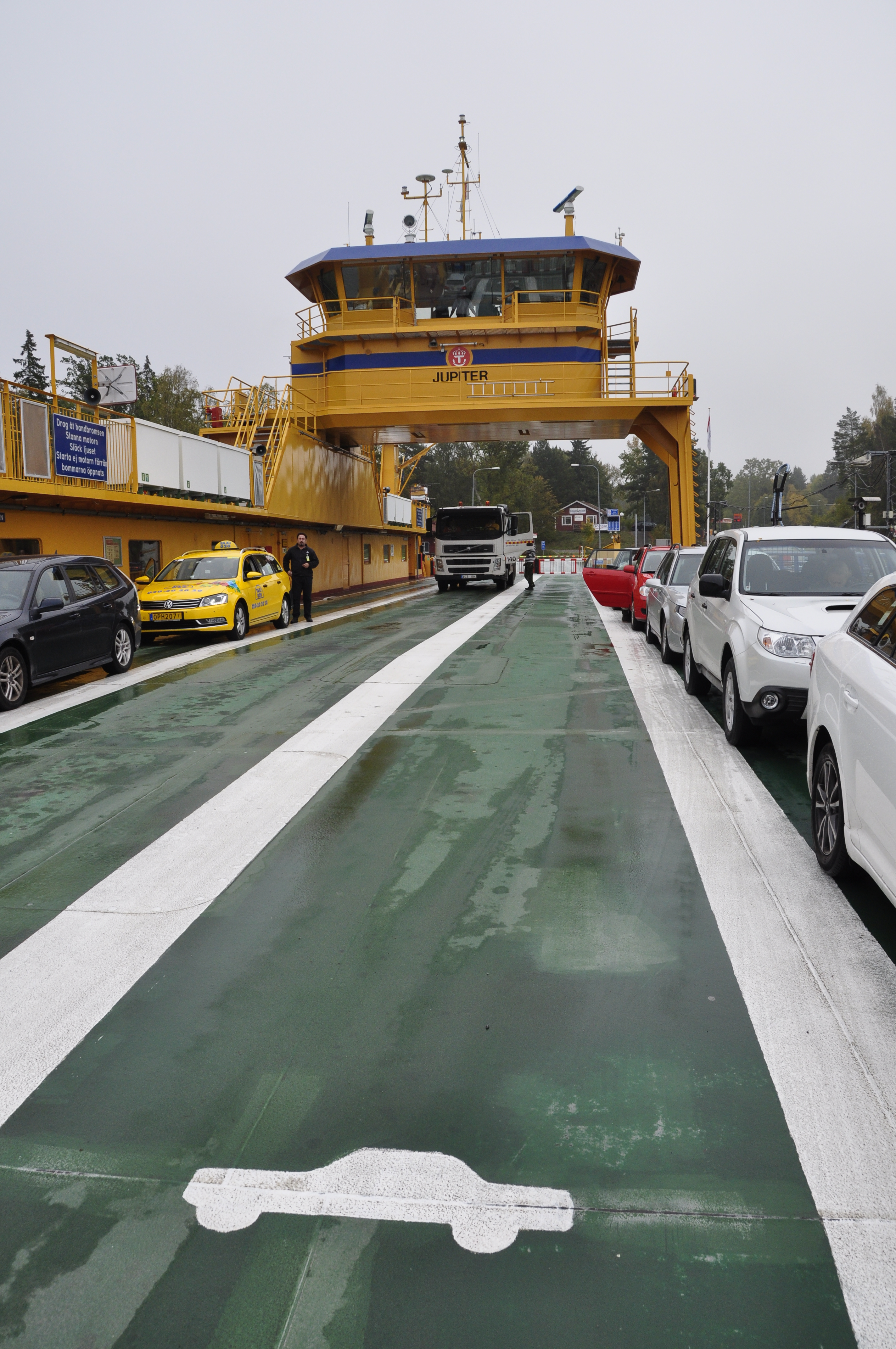 Ljusteröfärjan Jupiter lägger ut från Ljusterö färjläge